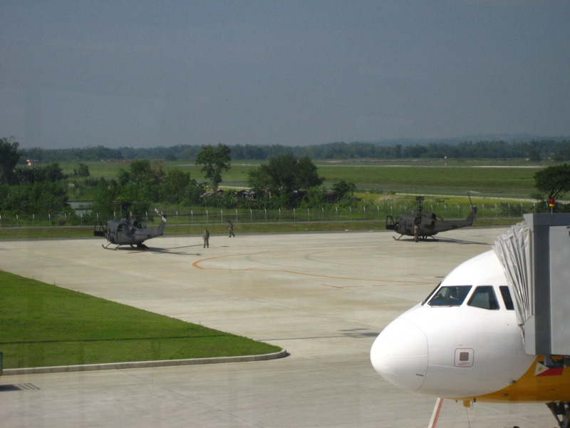 Iloilo International Airport, Philippines.